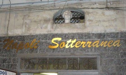 Accesso alla Napoli Sotterranea da Via S.Anna, Italia. /*foto effettuata sul posto*/